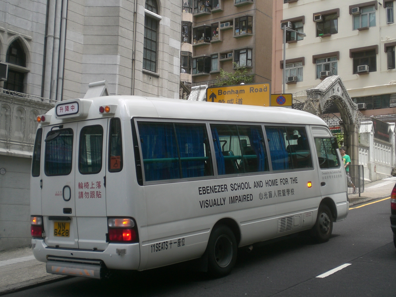 香港西邊街心光盲人院暨學校穿梭巴士